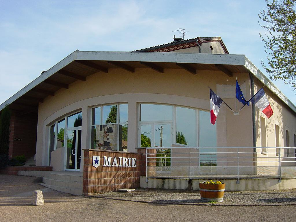 Mairie